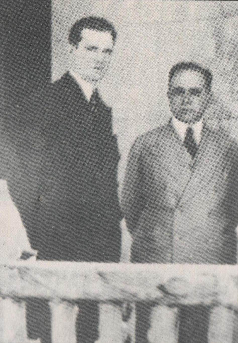 Fotografia de Ernesto Geisel, presidente do Brasil no período 1974-1979, e Getúlio Vargas, presidente entre 1930-1945/1951-1954. Na época em que a fotografia foi tirada, Vargas encontrava-se no cargo. Recife, Pernambuco.